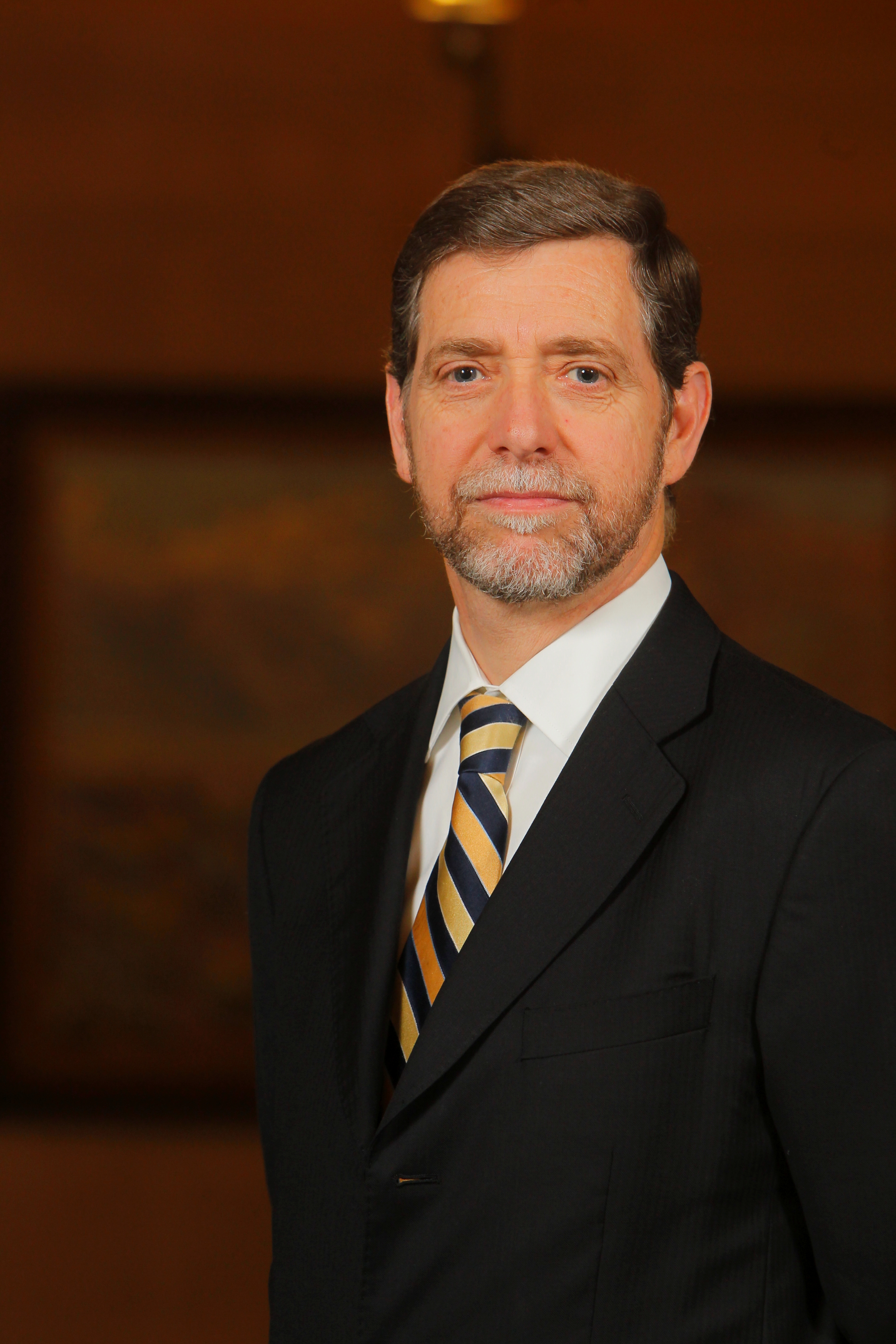 Consejero del Banco Central de Chile